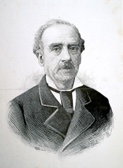 Published in Ilustració Catalana, t. XIII, n. 279, p. 56